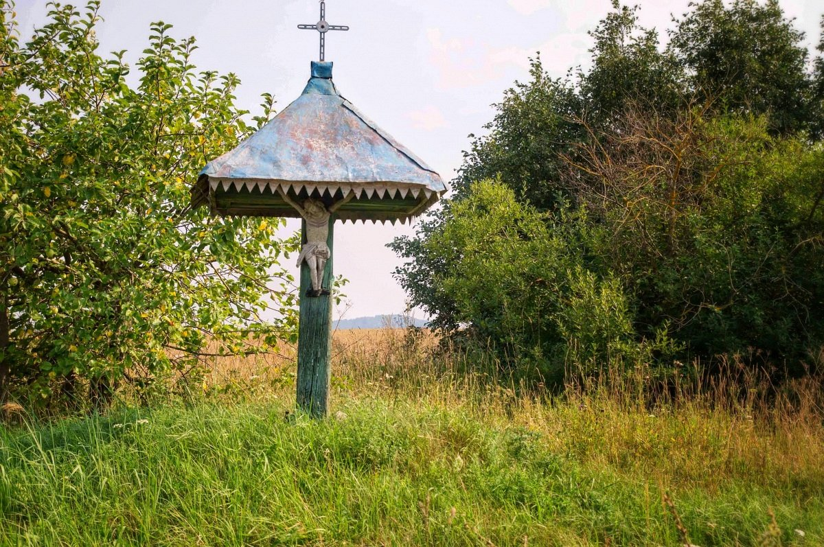 Сакавічы. Крыж на скрыжаванні